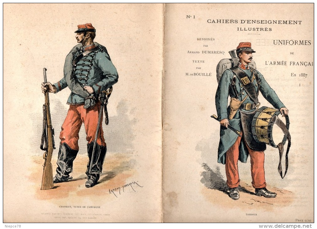 Les célèbres cahiers d'ensignement des uniformes du second empire dessinés par Armand Dumaresq